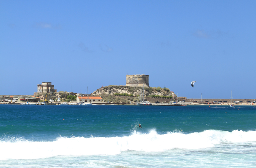 Bosa marina & Aragonese tower